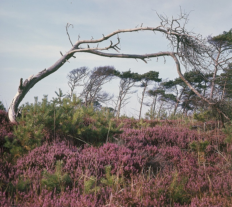 Original image description from the Deutsche Fotothek Darß. Windflüchter im Darßwald nahe dem Weststrand